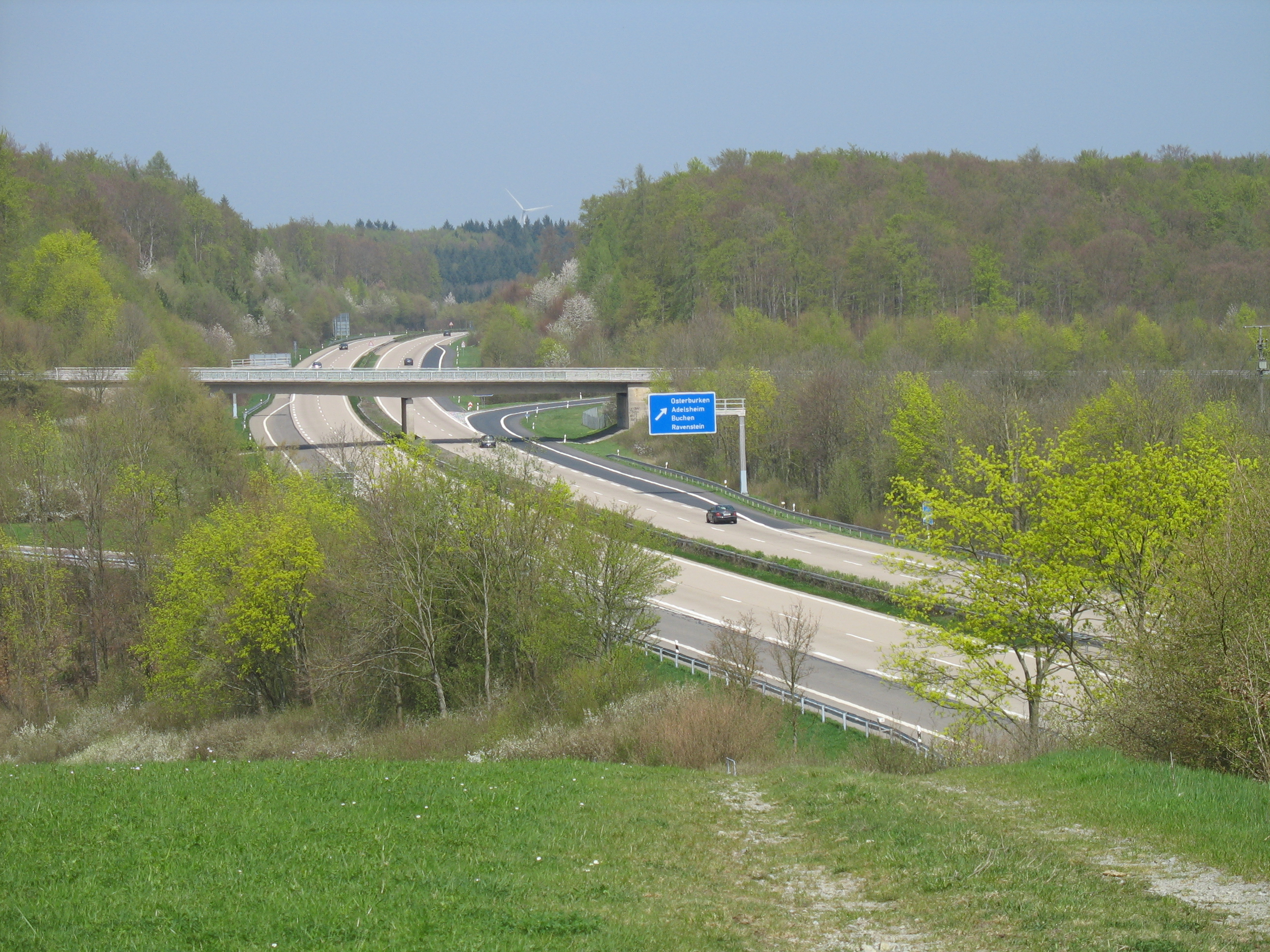 Blick auf die Ausfahrt Osterburken der Autobahn A81.